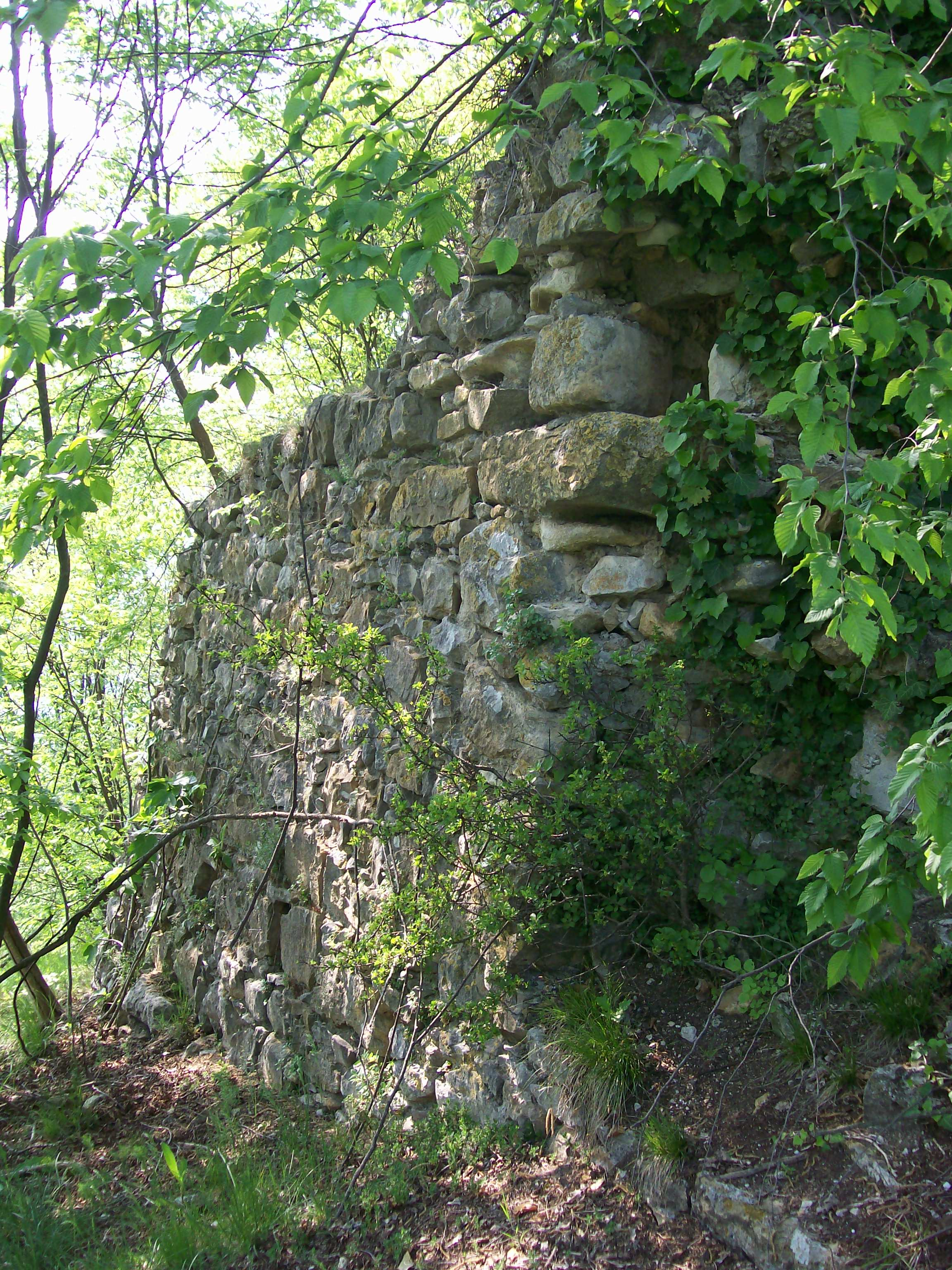 Un particolare dei resti della fortezza medievale presenti sul Monte Bastia.